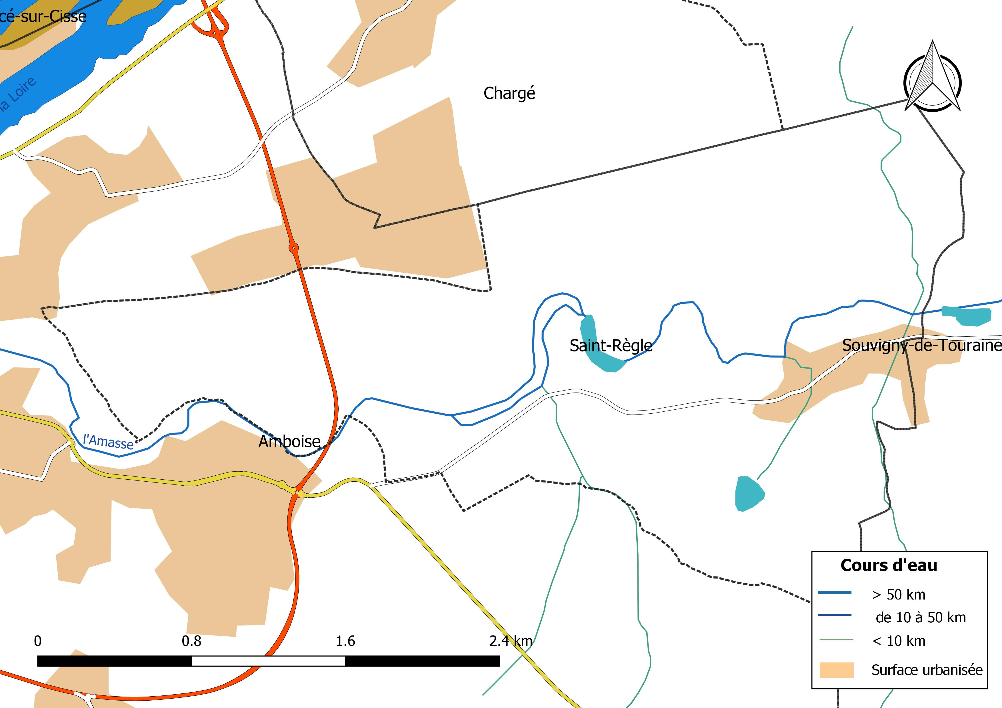 Carte du réseau hydrographique de la commune de Saint-Règle (France).